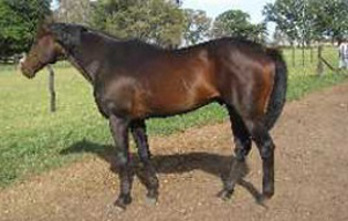 Caballo de Raza Polo Argentino